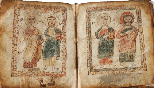 წყაროსთავის პირველი ოთხთავი